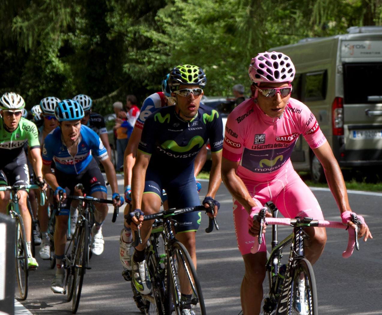 188 quintana